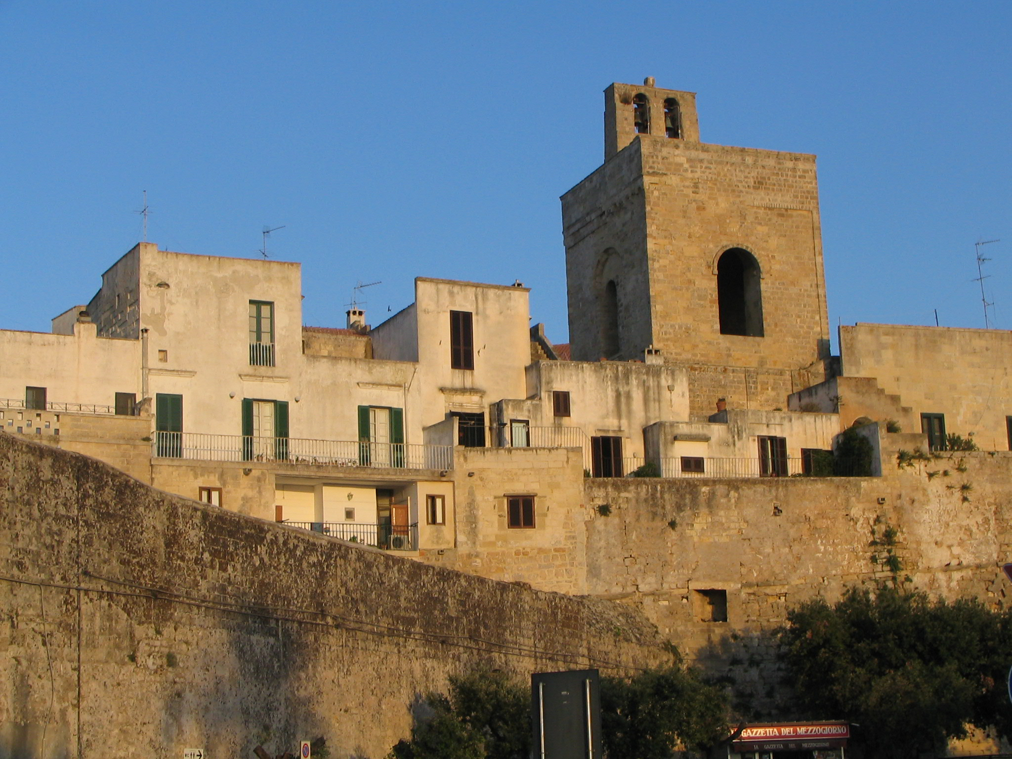 La città di Otranto. L'autore è Moiomax, ovvero questa è una foto fatta da me e chiunque può utilizzarla